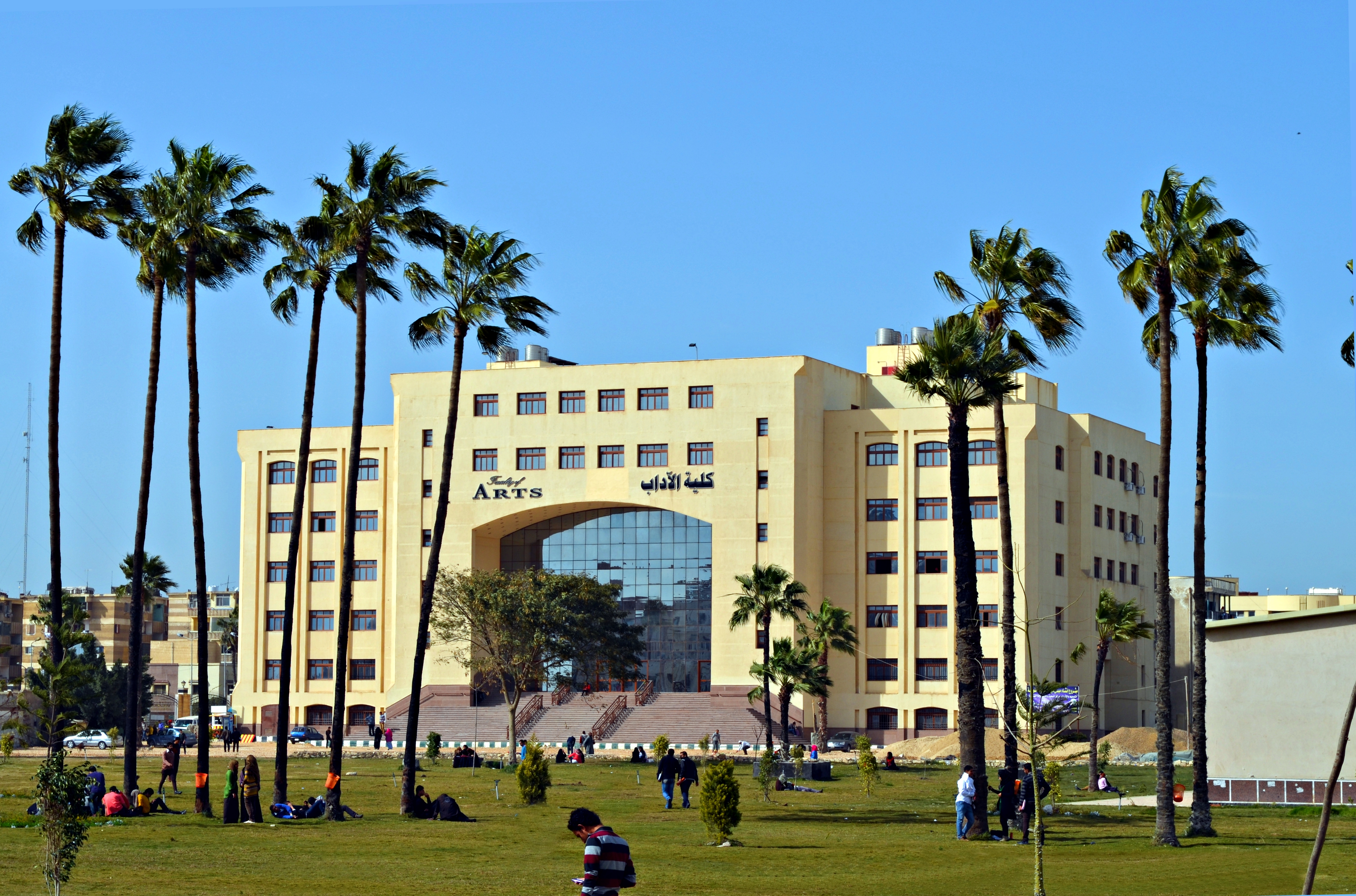 كلية الآداب، جامعة كفر الشيخ، مدينة كفر الشيخ، مصر